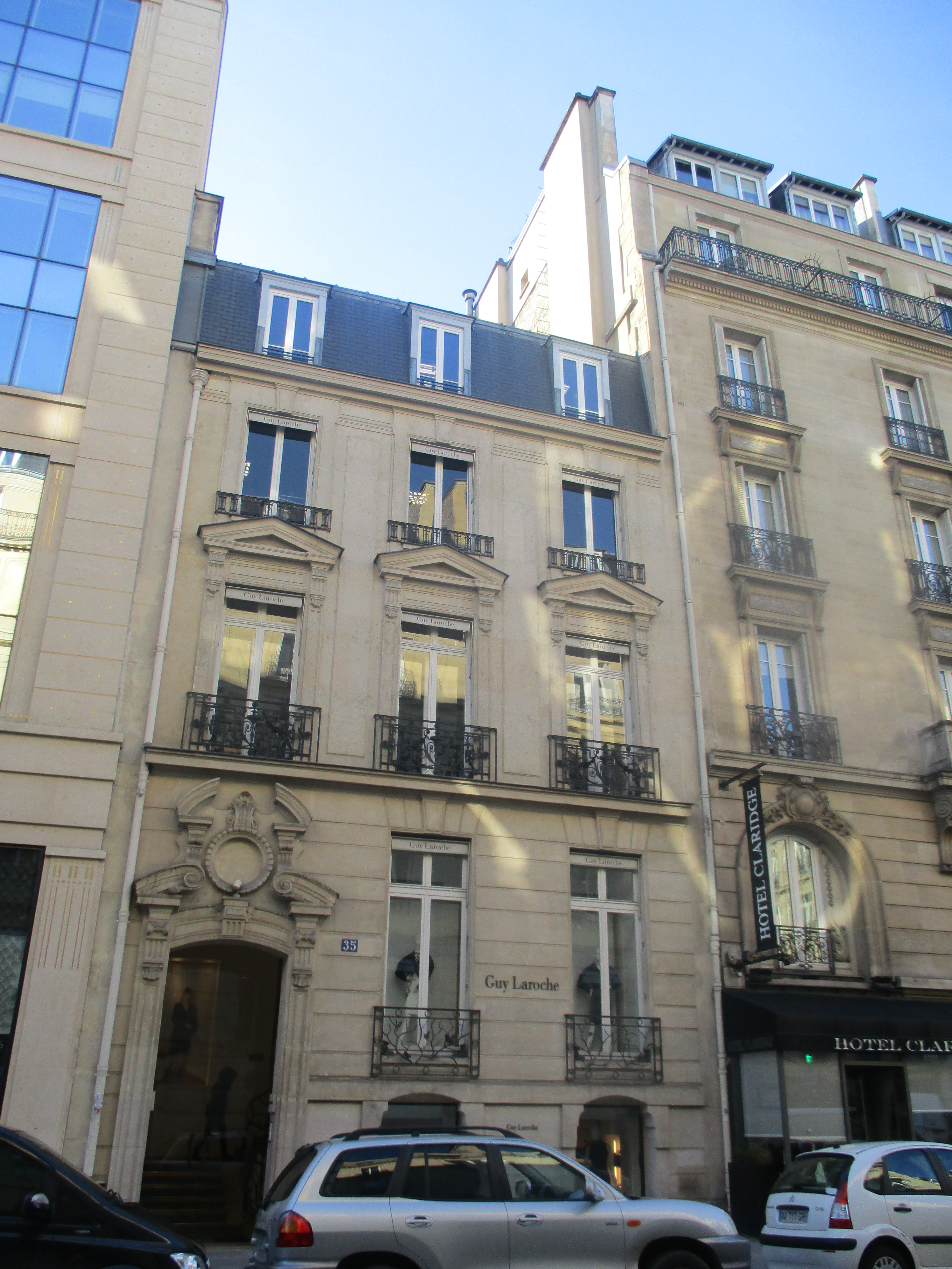 35 rue François-Ier, Paris VIIIe. Guy Laroche.